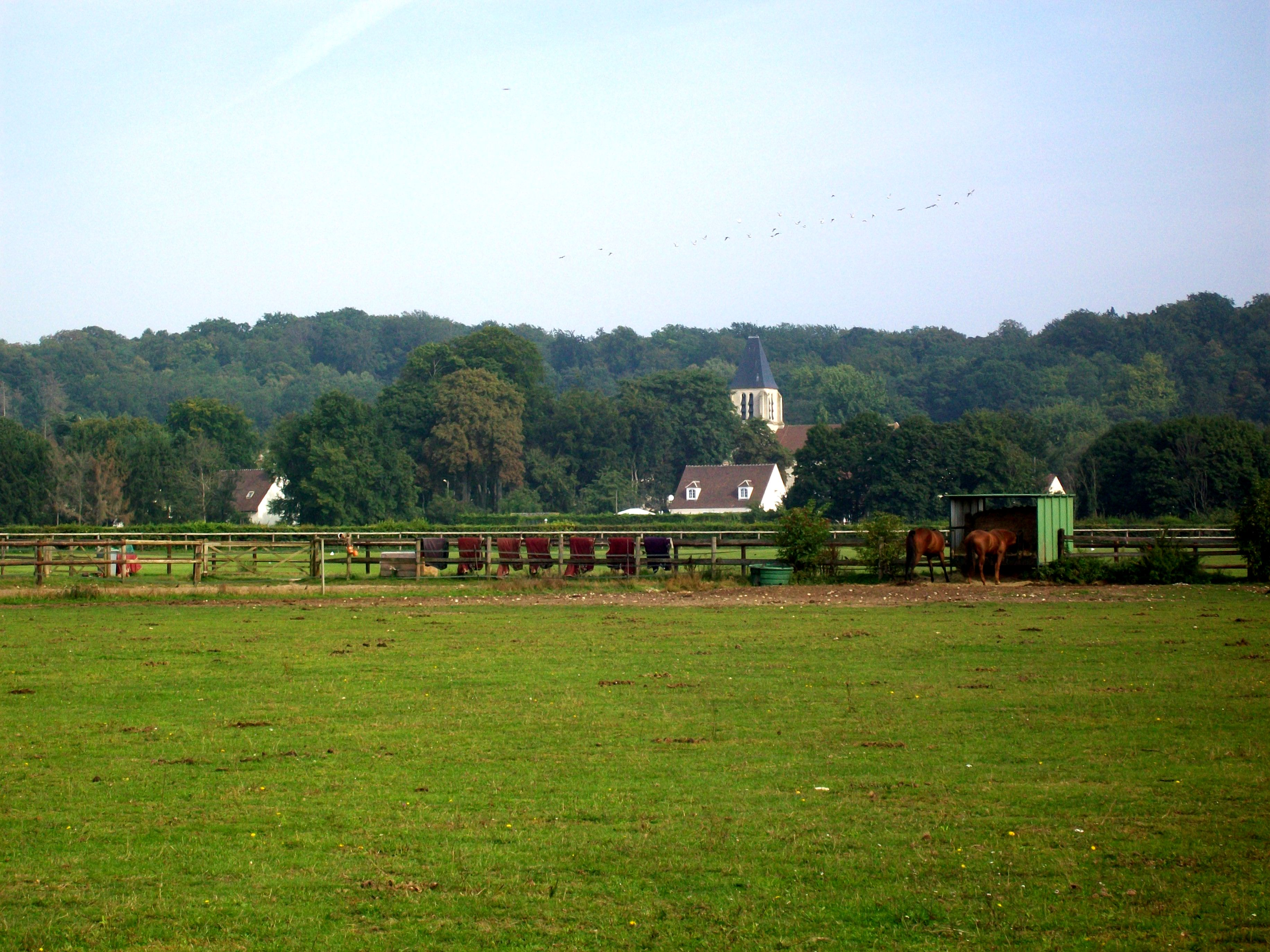 Vue sur le village depuis l'allée d'Apremont, en provenance de Vineuil.